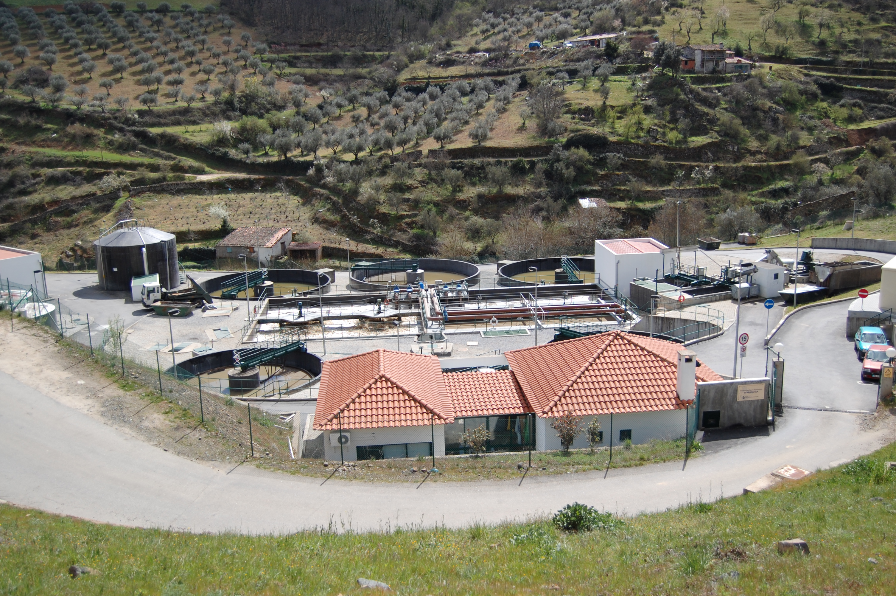 Estação de tratamento de água na cidade de Bragança, nordeste de Portugal.